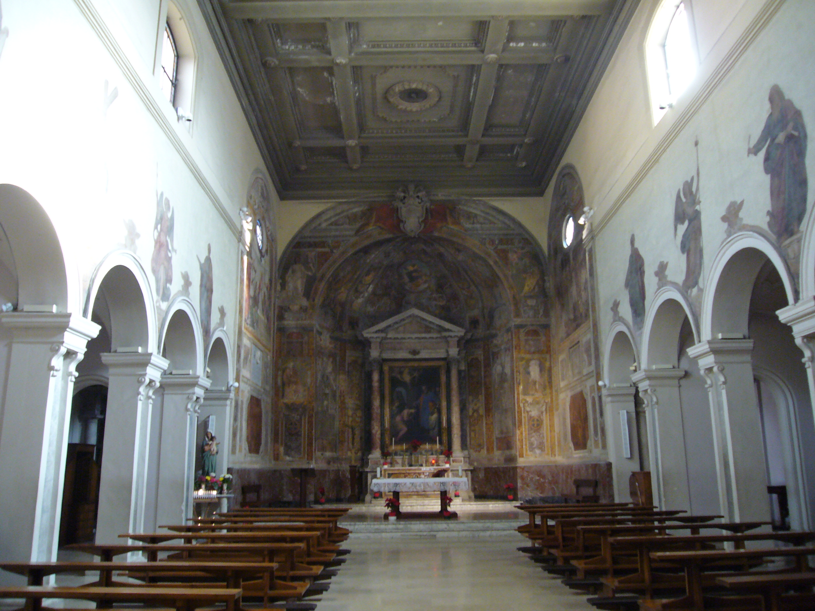 Roma, santa Prisca: interno